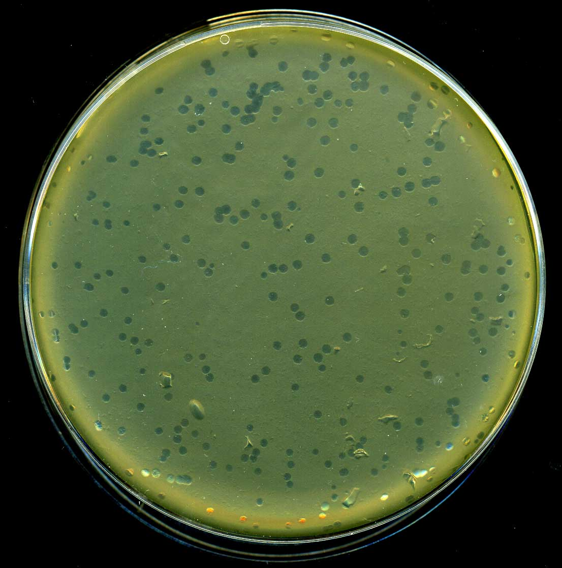 Plaques of Lambda Phages on E. coli XL1-Blue MRF'